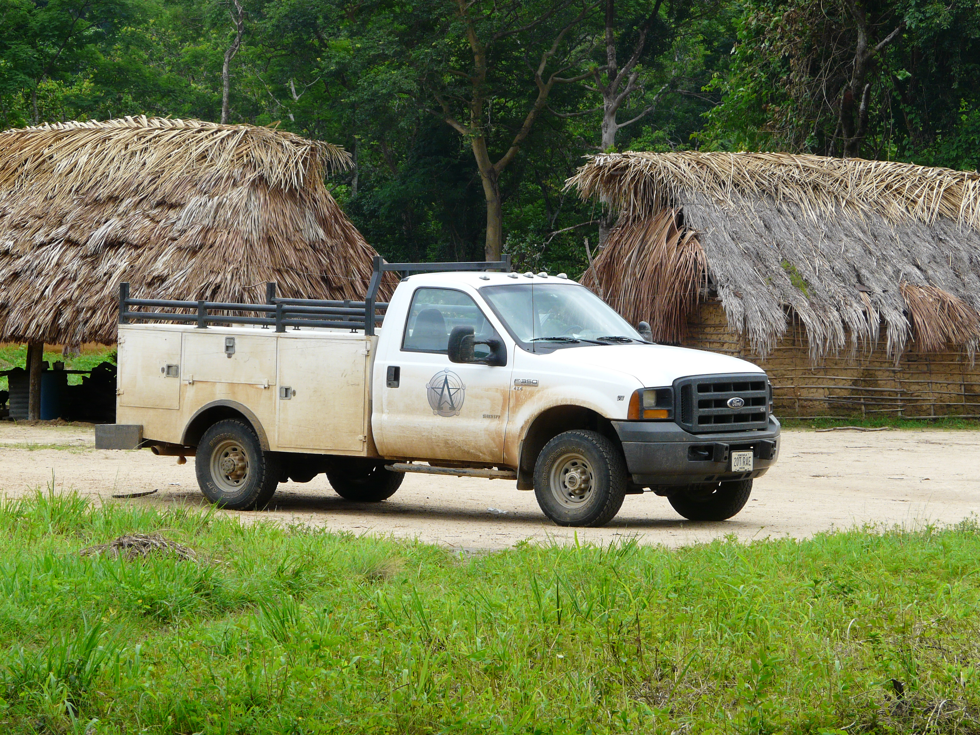 Visita de investigadores de la Universidad de los Llanos a la comunidad Panare de Corozal.